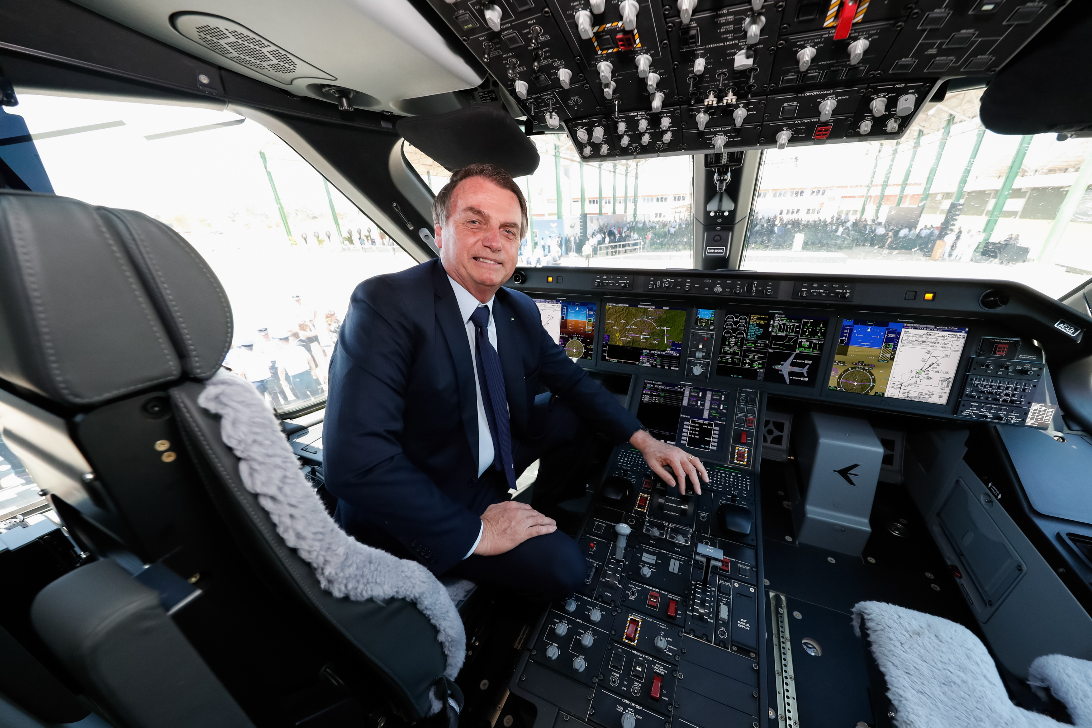 (Anápolis - GO, 04/09/2019) Presidente da República Jair Bolsonaro, durante cerimônia de recebimento da Aeronave KC-390 pela Força Aérea Brasileira.Foto: Alan Santos/PR